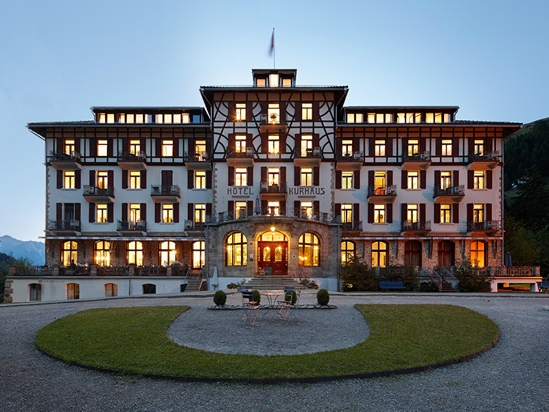 Aussenansicht Süden